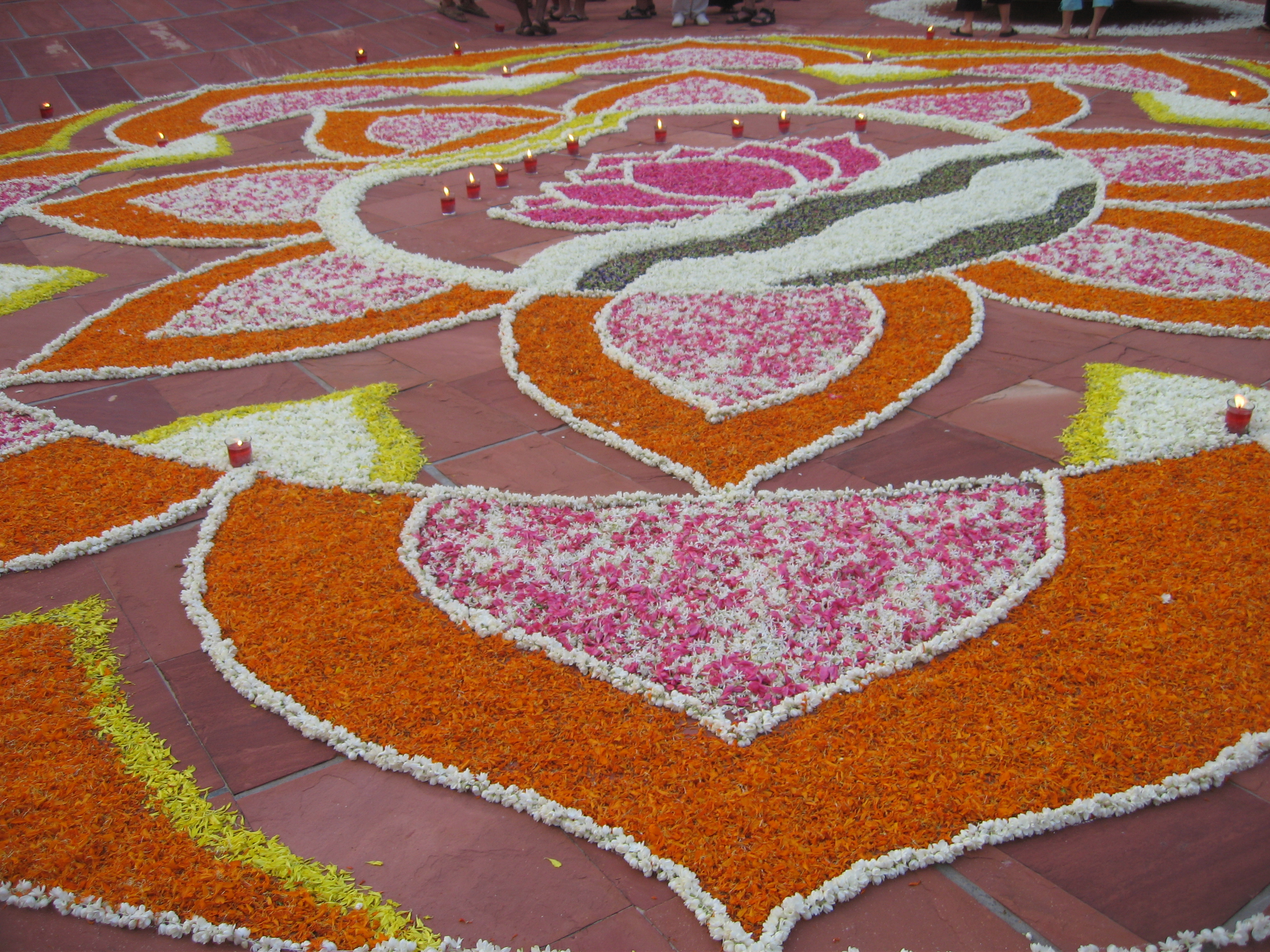 தமிழகத்தின் மரபார்ந்த மலர்க் கோல அலங்காரக் காட்சி